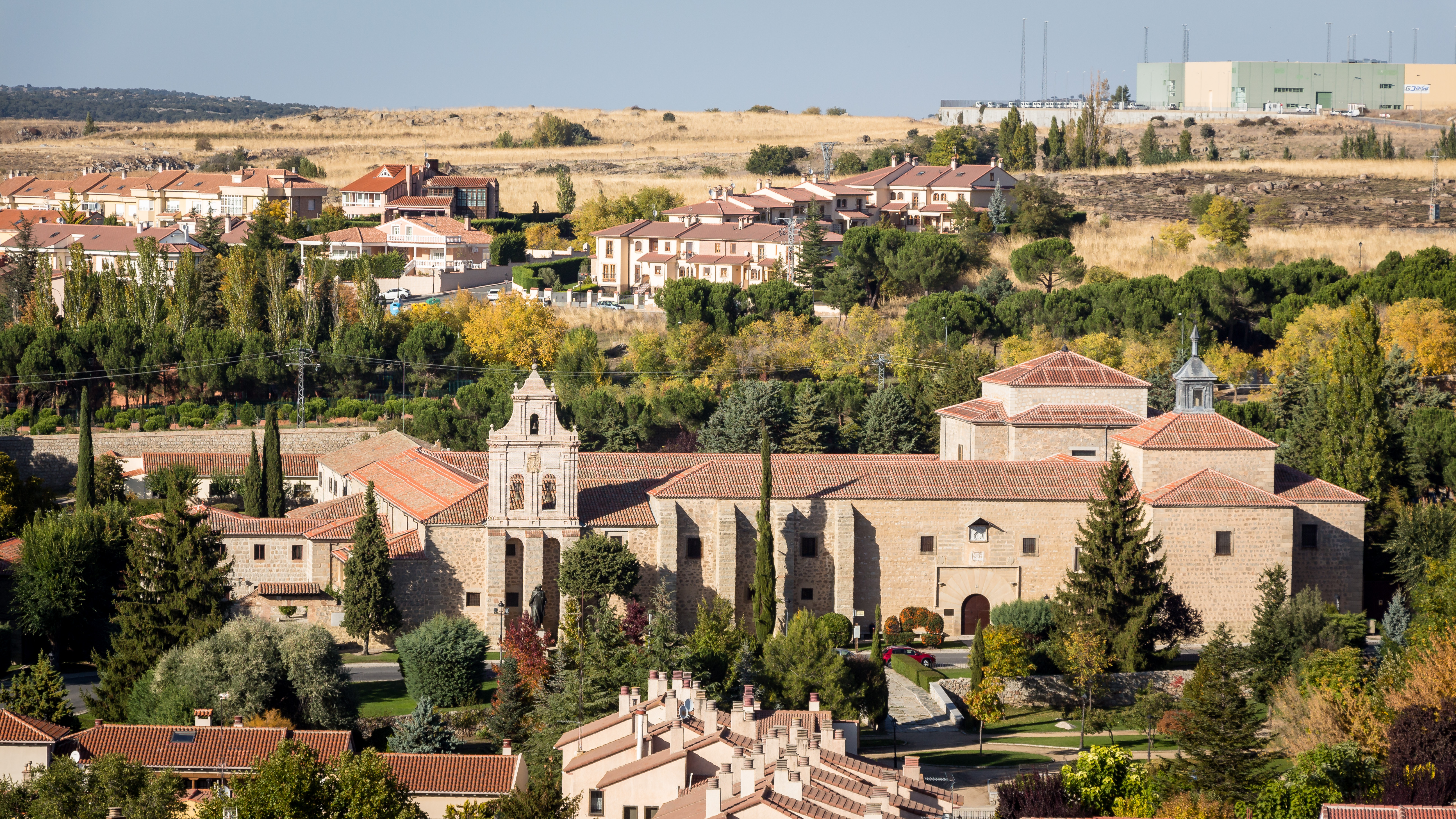 Monasterio de la Encarnación